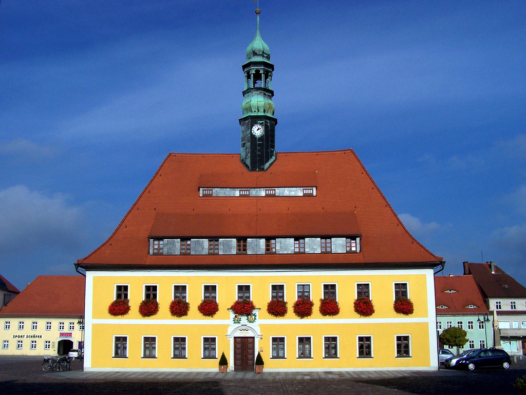 Das Rathaus von Neustadt in Sachsen